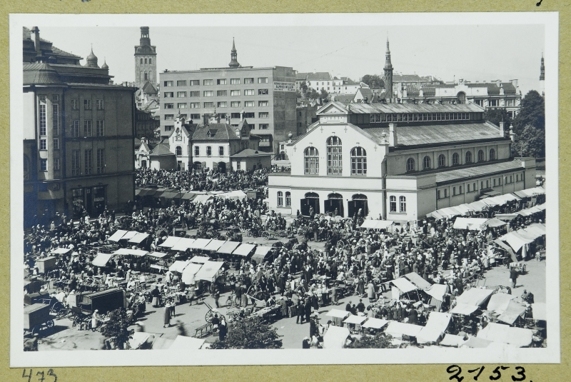 Vaade Uuele turule ja turuhoonele, vasakul Estonia teater